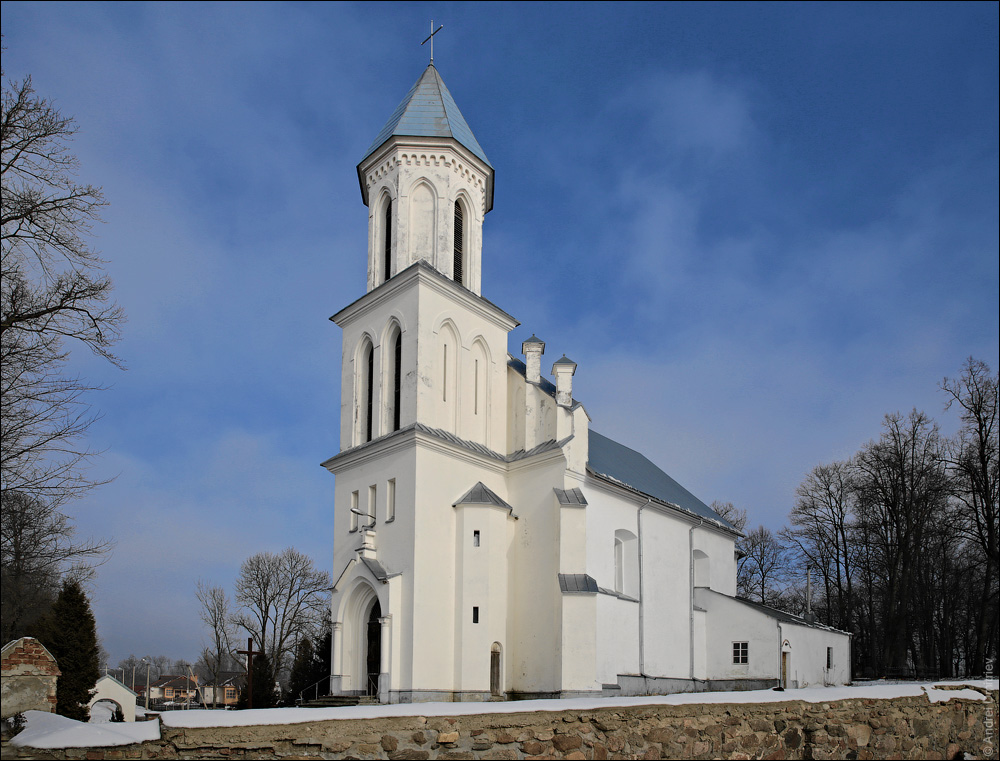 Уселюб. Касцёл Святога Казіміра